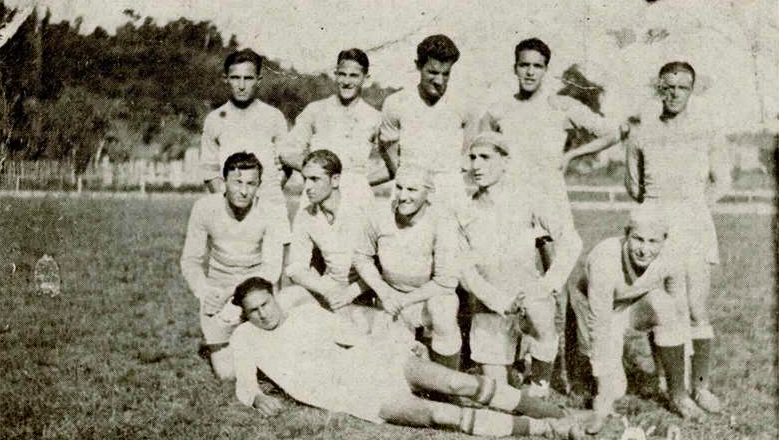 Equipe do Esporte Clube Juventude de Caxias do Sul. Só foi identificado com segurança Alcides Longhi, o quarto da esquerda para a direita, na fila da frente.